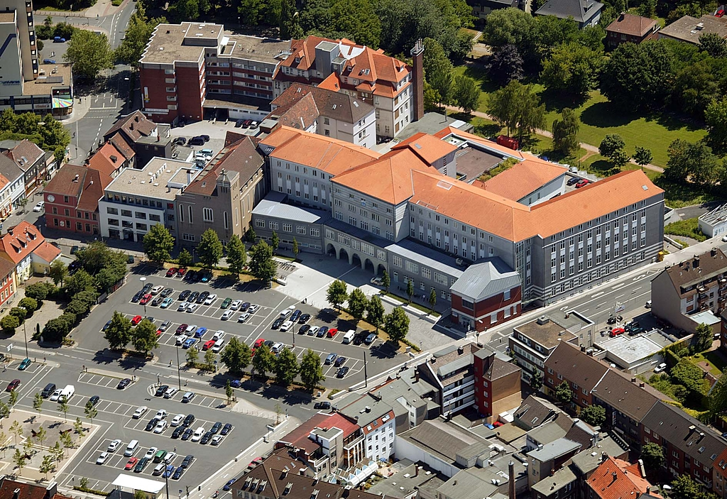 Klinik Hauptgebäude an der Nassauerstraße